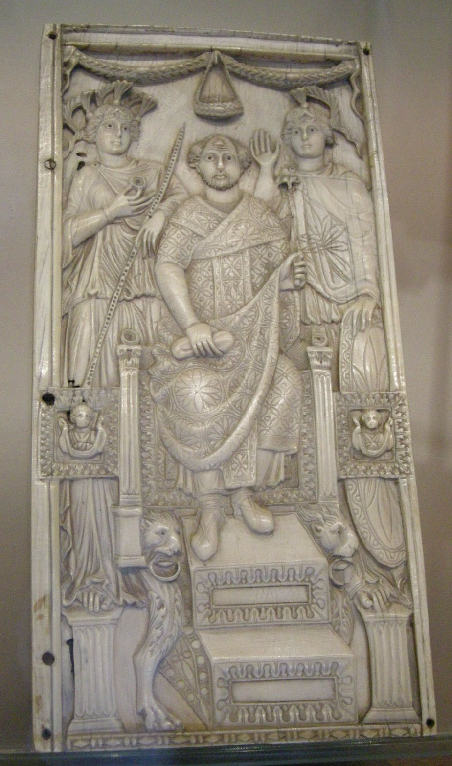 Valva di un dittico consolare di Magno, console a Costantinopoli nel 518 d.C., affiancato dalle allegorie di Roma e Costantinopoli. Raccolte d'arte applicate del Castello Sforzesco di Milano.